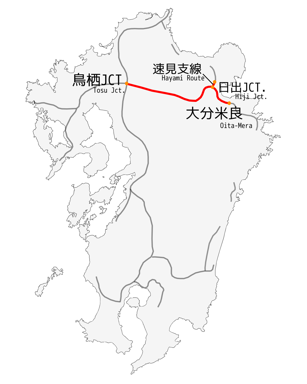 大分自動車道の路線図。